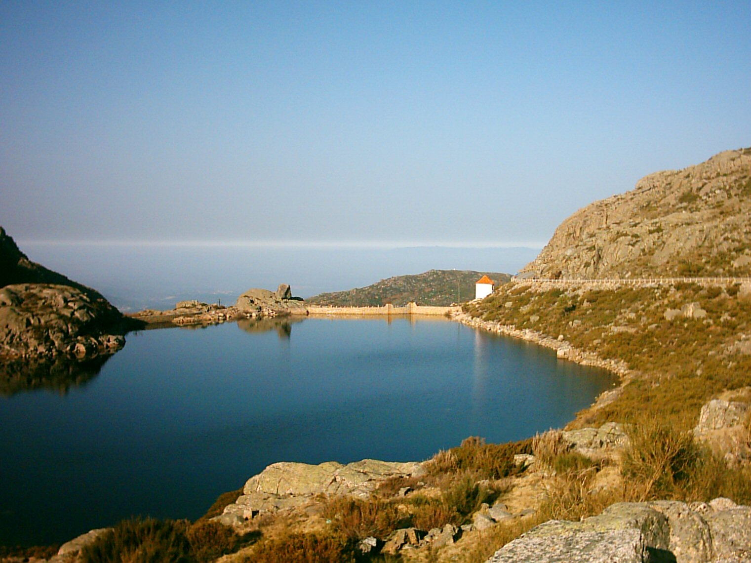 Vista da Serra da Estrela, Portugal